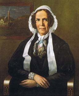 Porträtgemälde von Christine Englerth